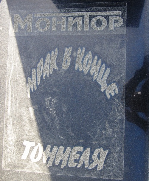 Elmar Hüseynovun qəbirüstü abidəsinə həkk olunmuş Monitor jurnalı